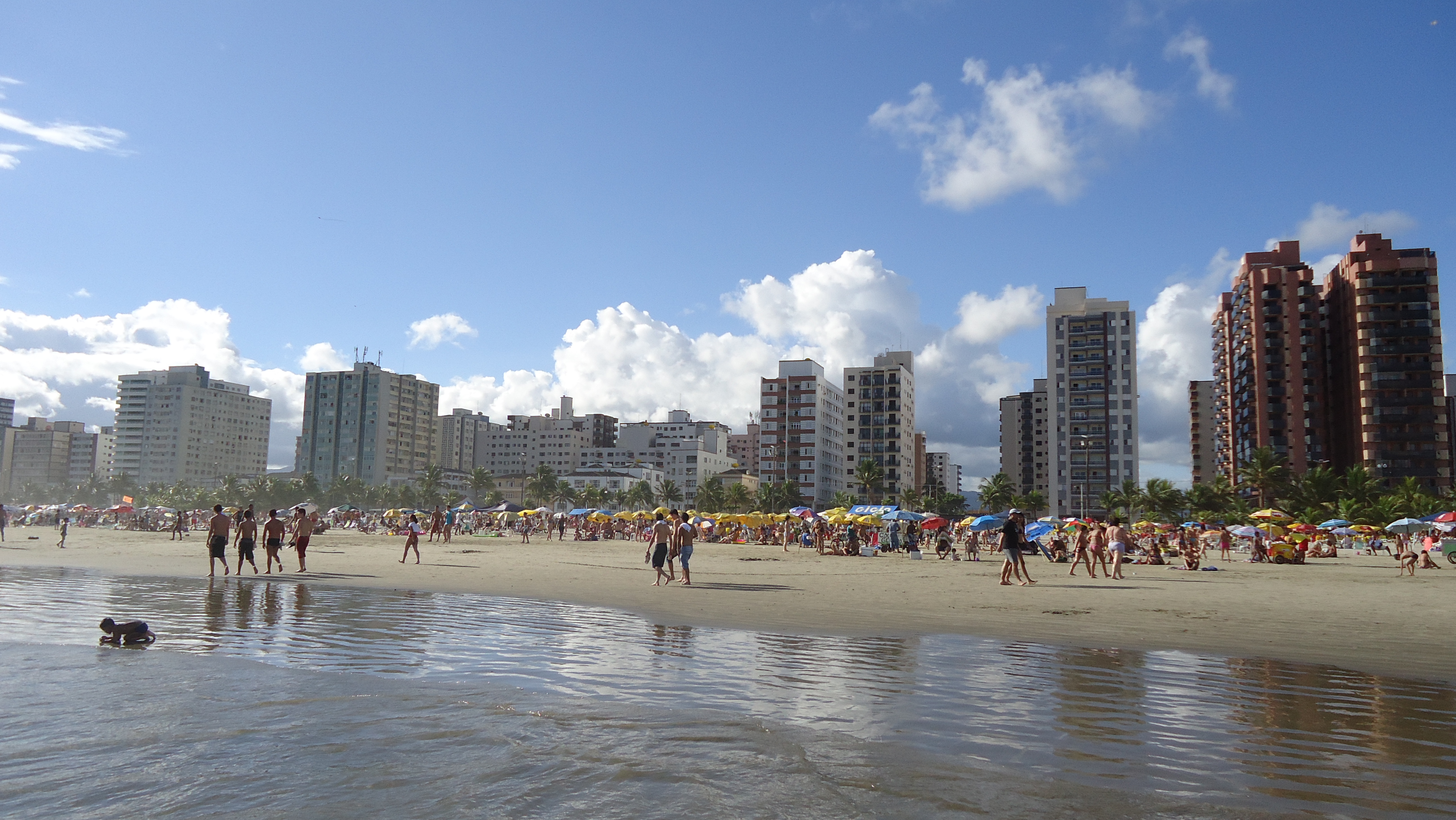 GUILHERMINA - DEZ 2010